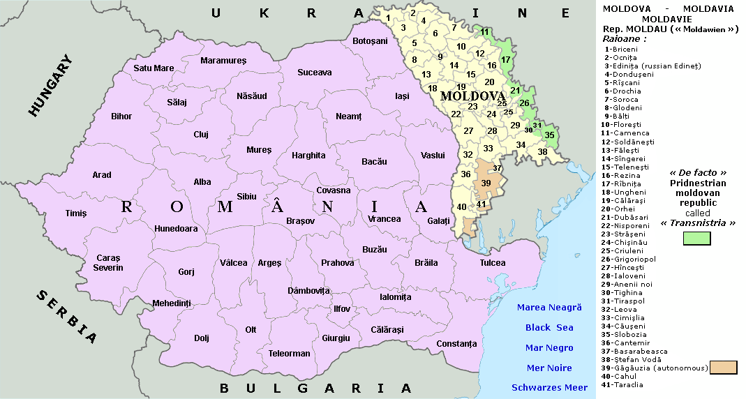 Divisions administratives des états roumanophones depuis 2011